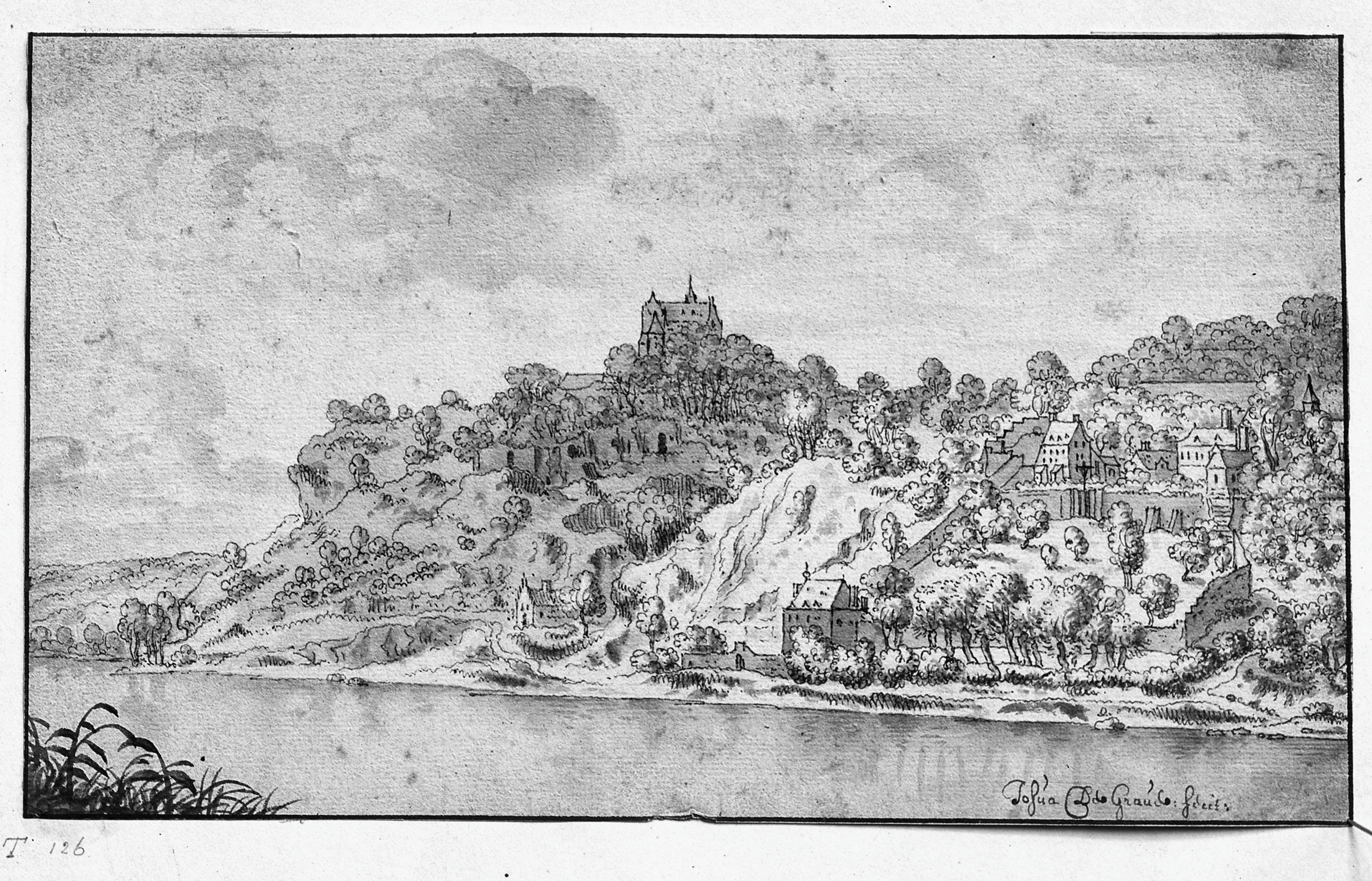 Slavante: Foto van tekening van de ruïne Lichtenberg en het klooster Slavante (opmerking: Tekening in oost-Indische inkt, berustend volgens aantekening in het Rijksarchief)